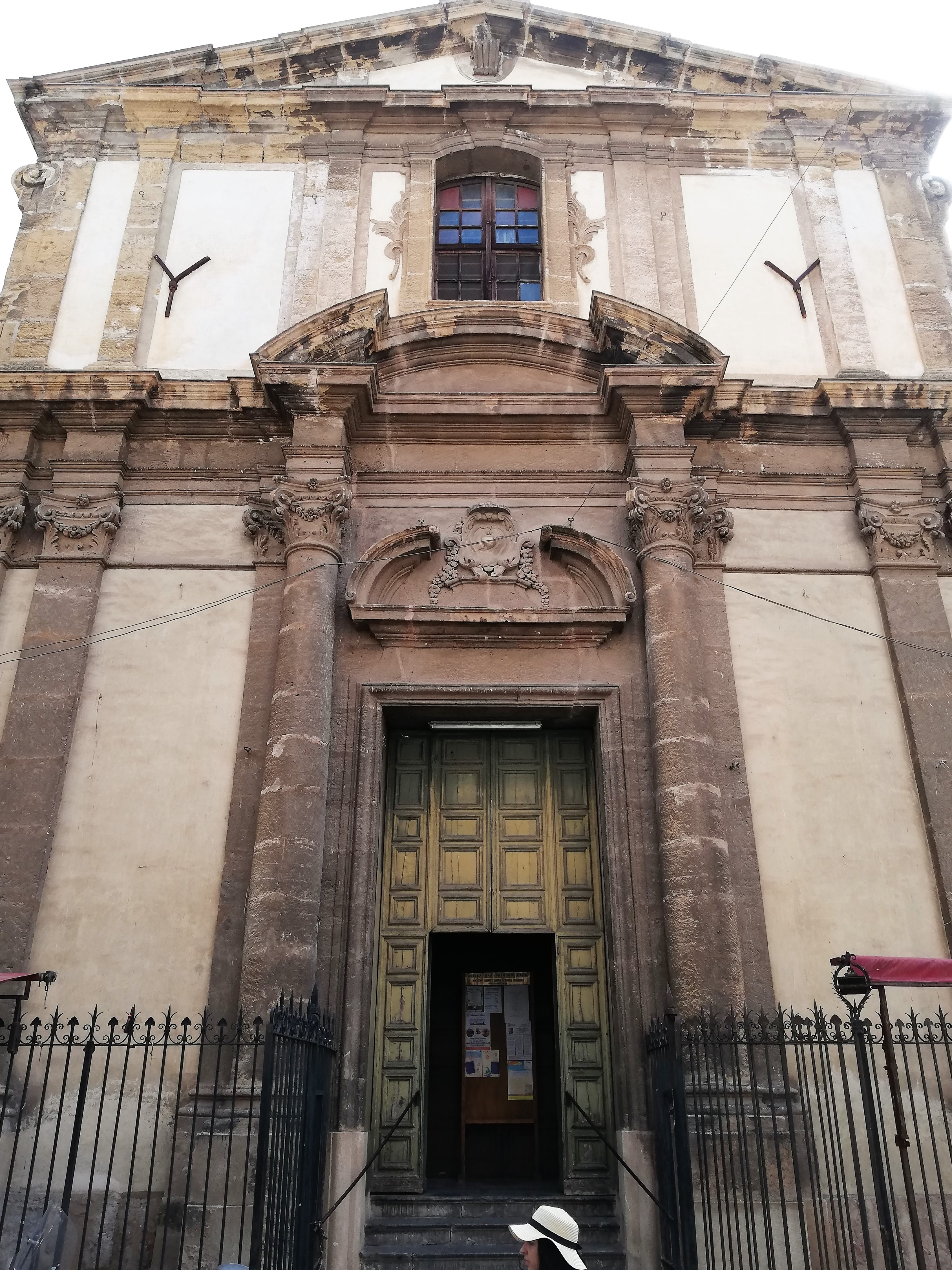 Facciata.